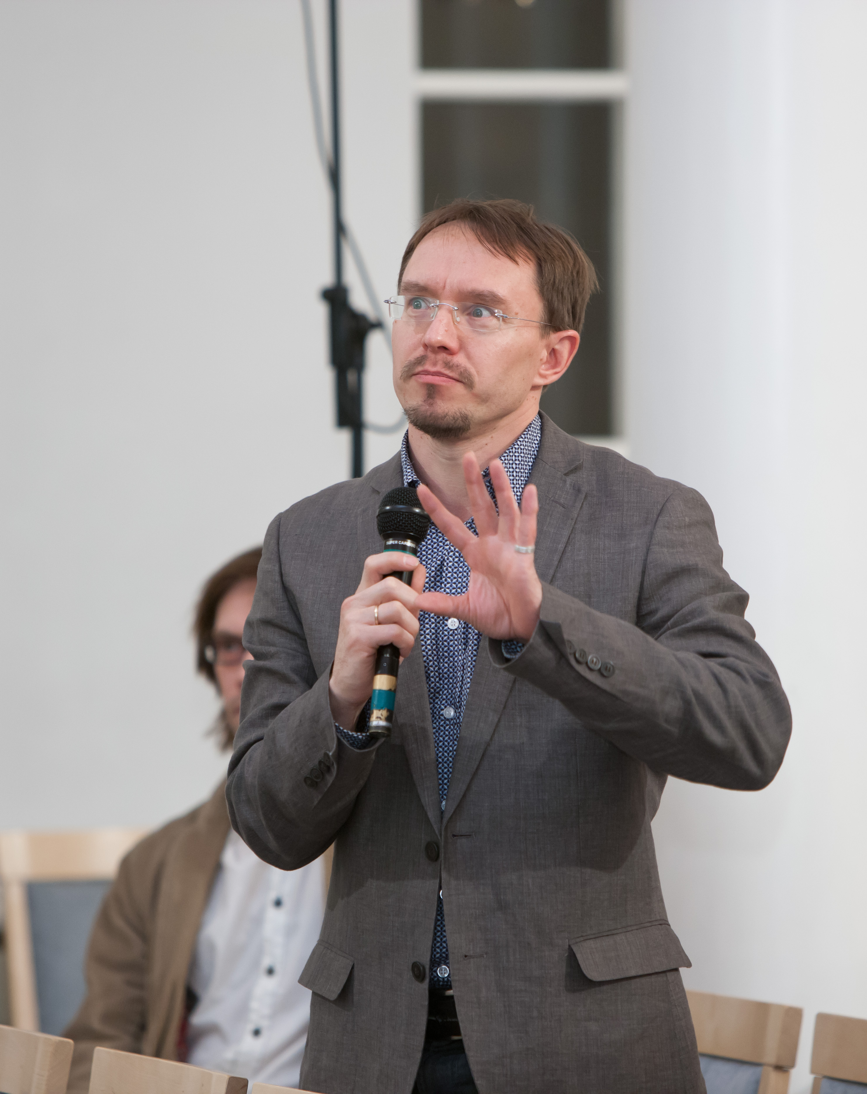 Professor Vello Pettai 2011. aastal Tartu Ülikooli Euroopa Liidu Venemaa uuringute professori Viacheslav Morozov inauguratsiooniloengul TÜ aulas.